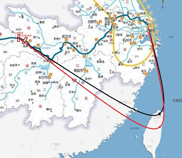 导弹从台北飞往上海和三峡大坝的示意图